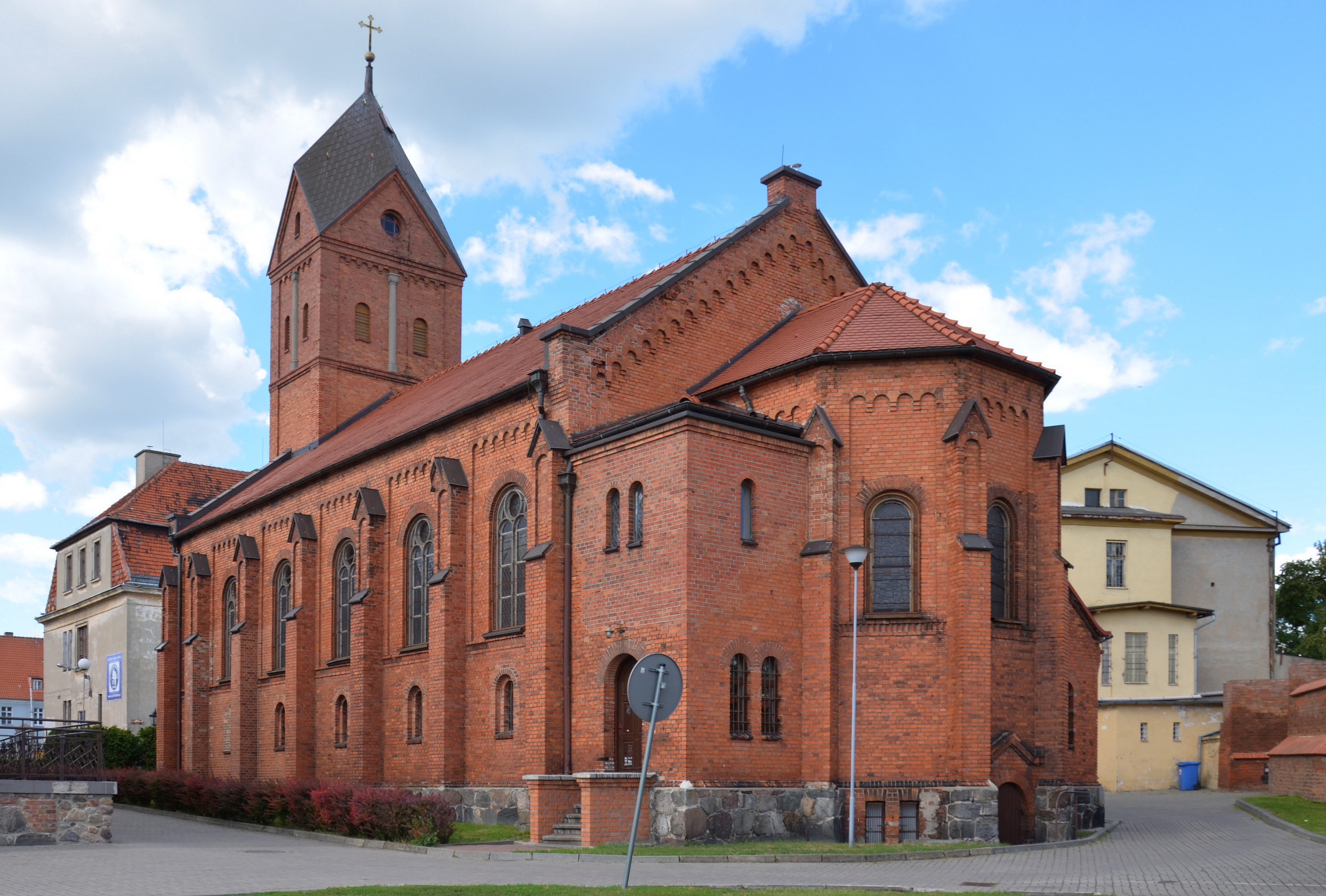 Chełmno, Aleja 3 Maja 3 - dawny kościół ewangelicki, obecnie rzymskokatolicki (garnizonowy) p.w. MB Częstochowskiej, 1874-1875